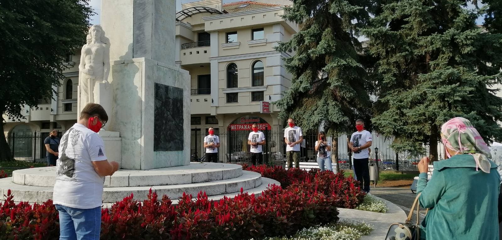 Помен жртвама и јунацима Великог рата.